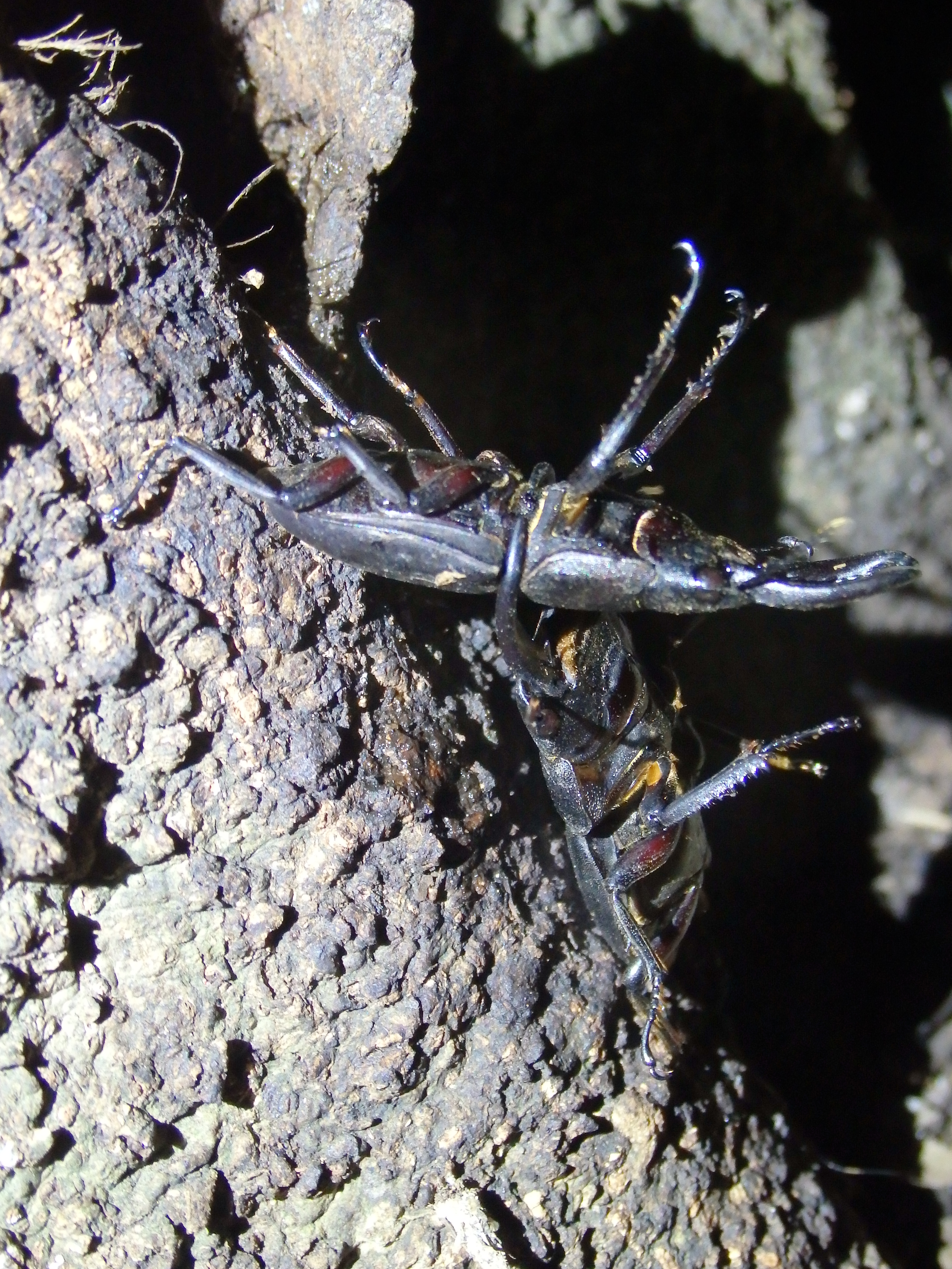 ヒラタクワガタのオス同士のケンカ